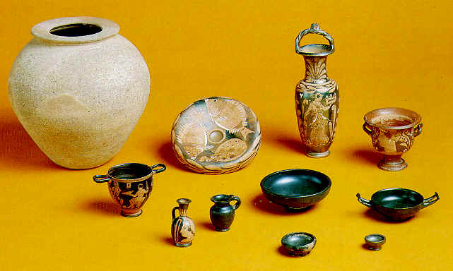 Nel 1990, realizzando alcuni scavi di impianto, vennero ritrovate sette tombe del periodo sannitico del IV secolo a.C.